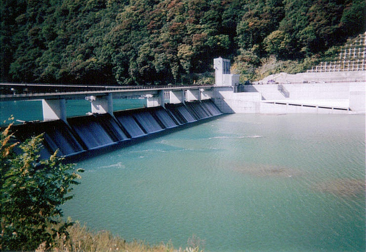 Dam